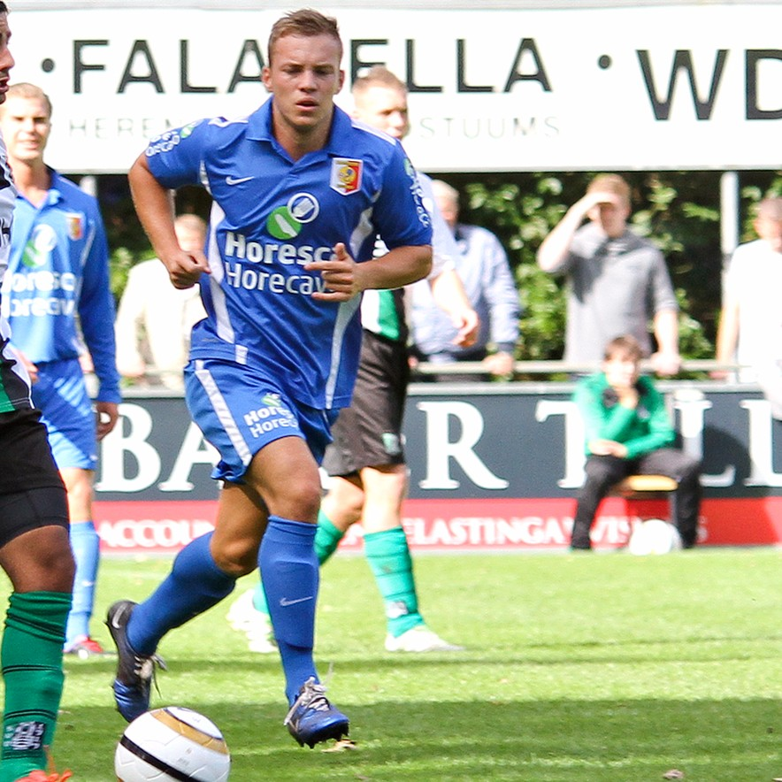 Kees Pier Tol namens VV Noordwijk in de wedstrijd tegen SVV Scheveningen op 22 september 2012.